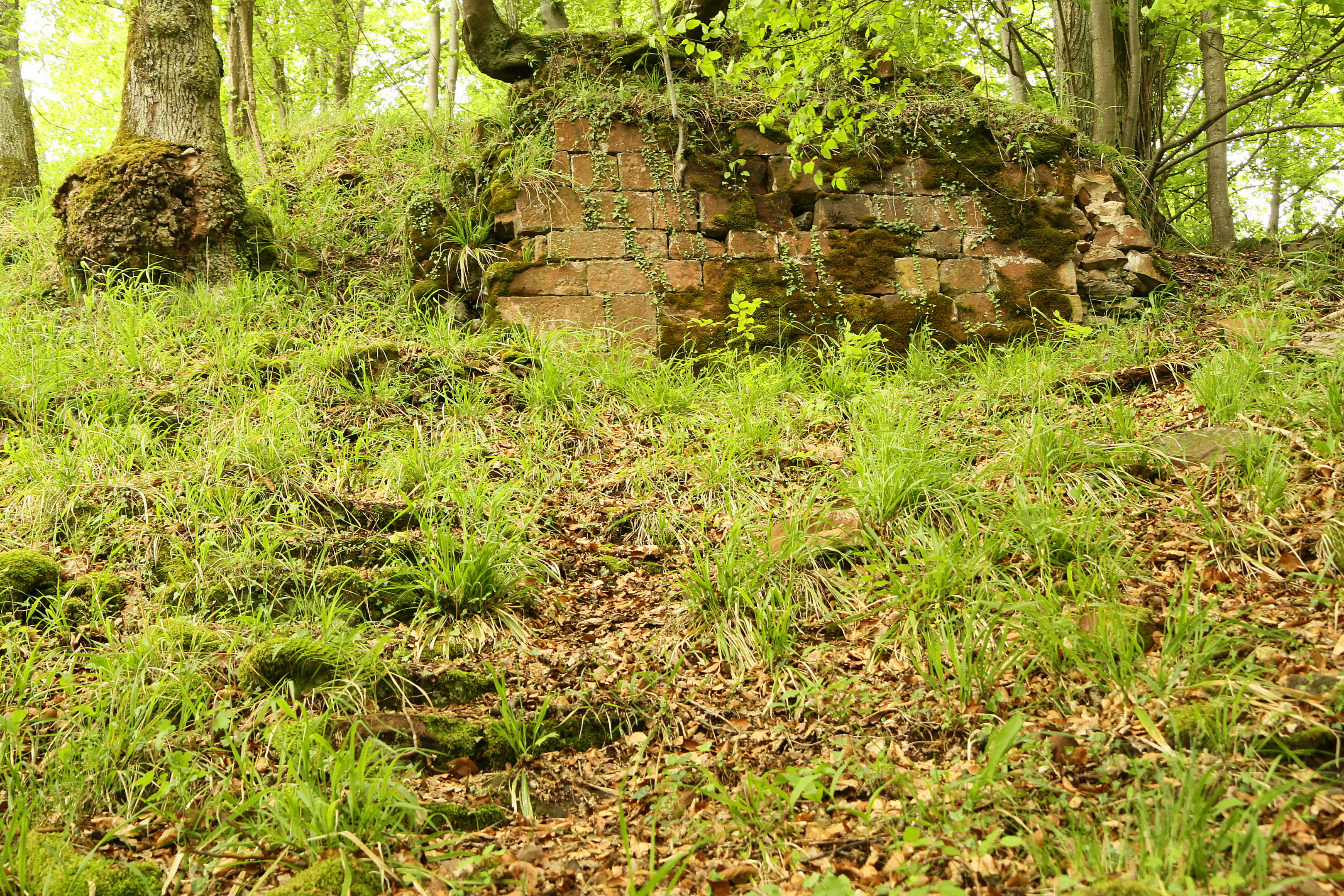 Treppenstufen und Mauerrest der Burg Alt-Montclair, etwa 200m südwestlich der Burg Neu-Montclair.